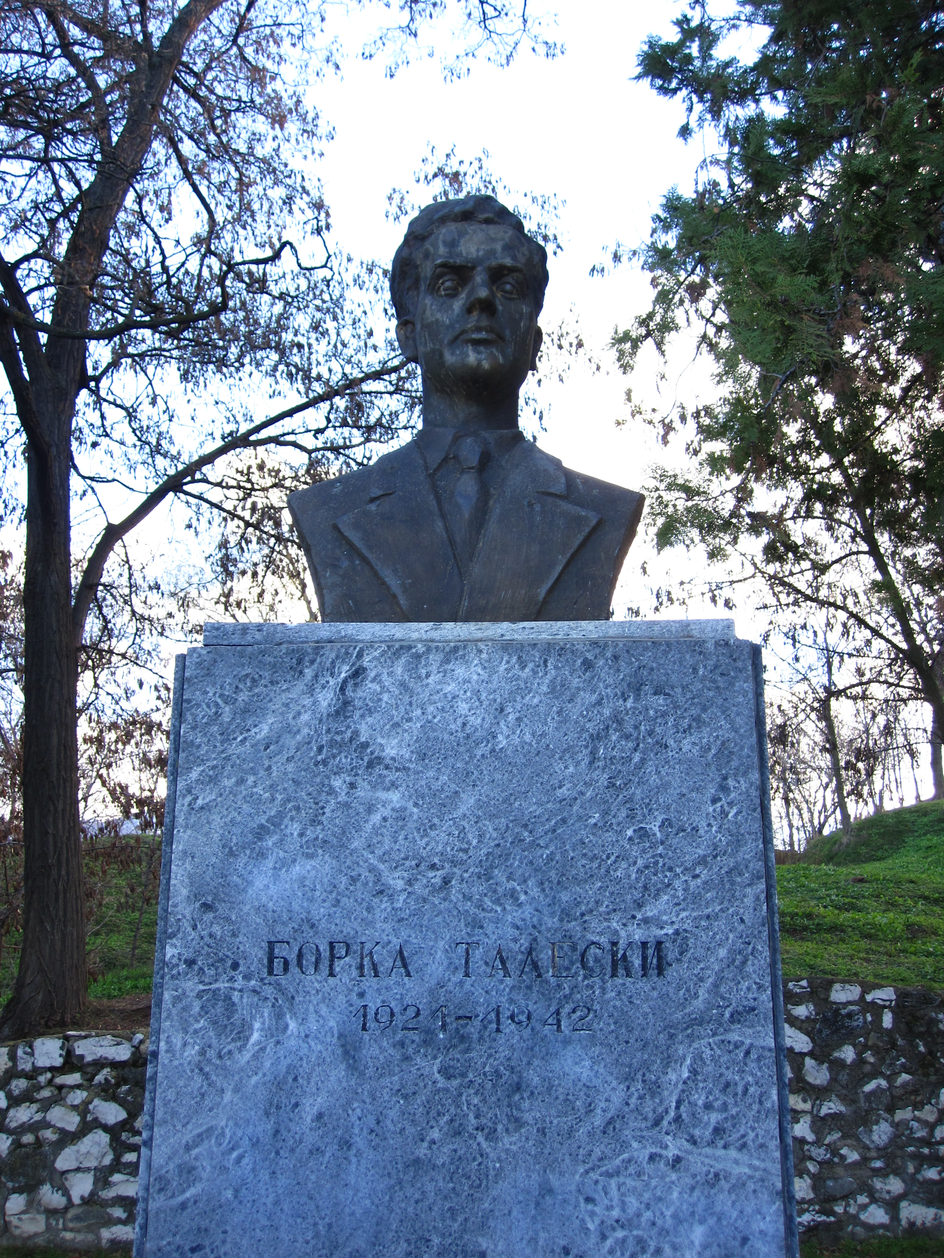 Биста - Борка Талески - Прилеп